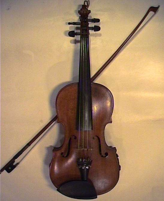 Mijn viool. Eigen foto uit eigen verzameling hierbij in Publiek Domein. Categorie:Afbeelding muziekinstrument